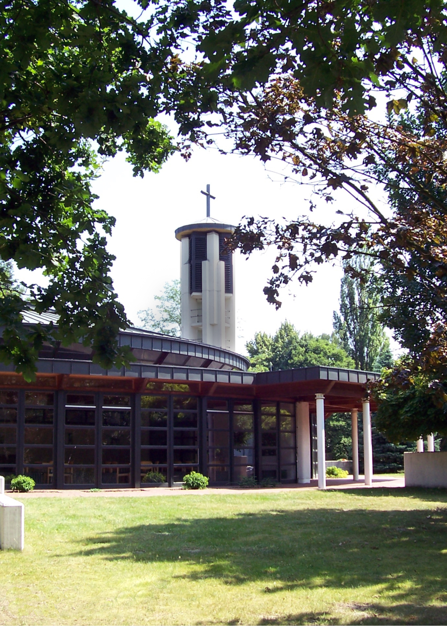 Außenansicht der Thomaskirche im Heidberg (Braunschweig)